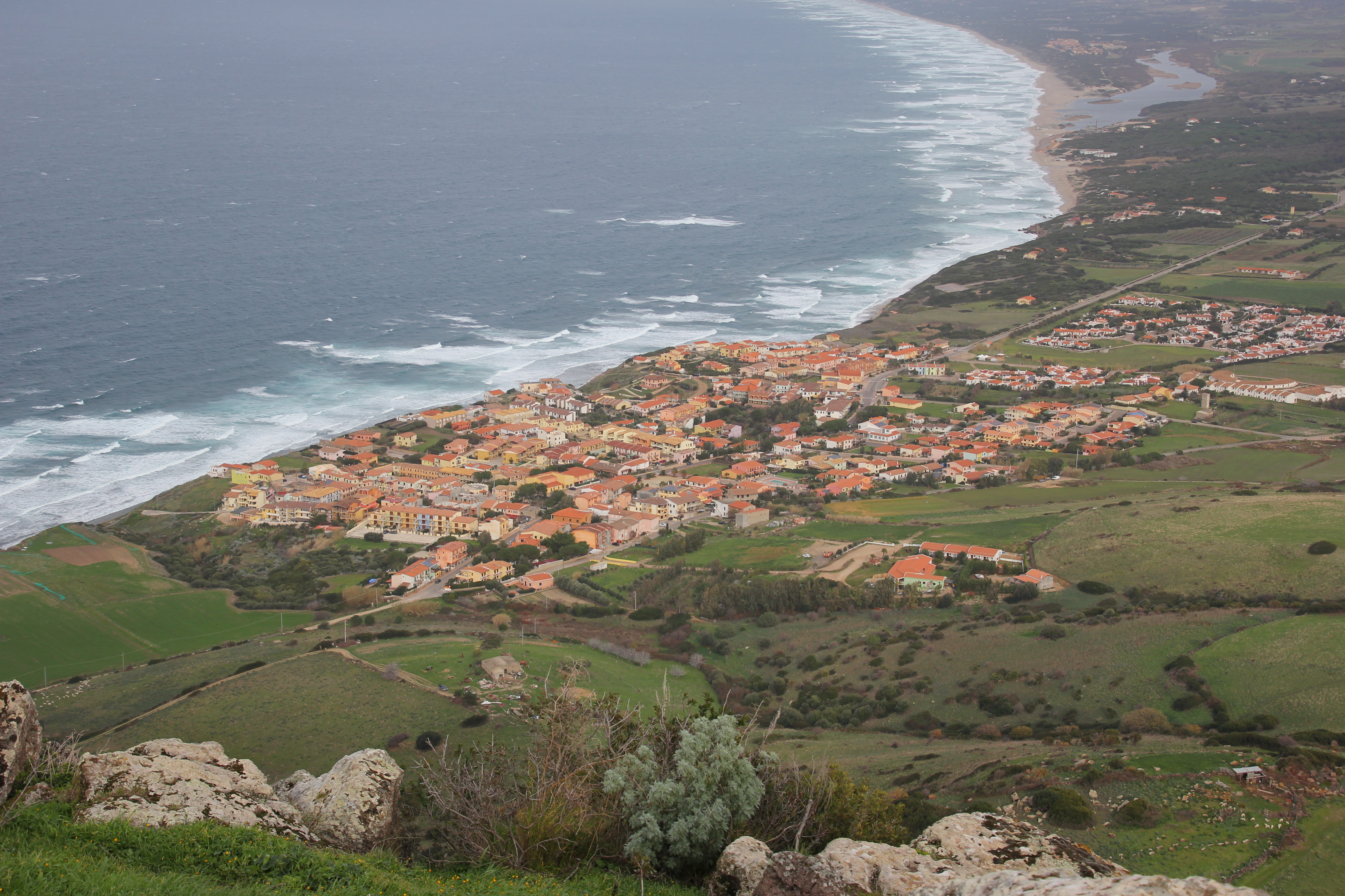 Valledoria - La Ciaccia - Panorama